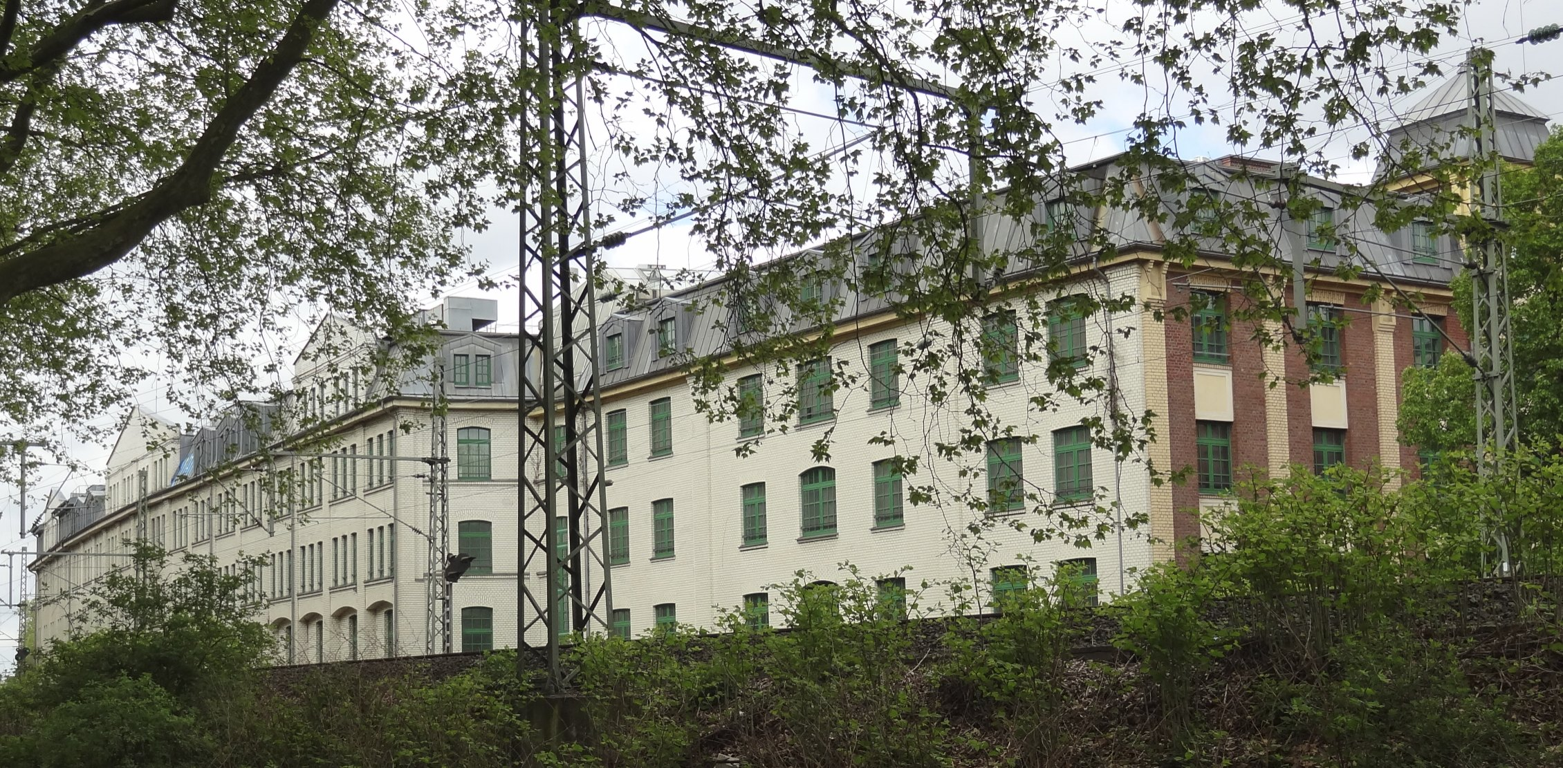 Die von 1930 bis 1982 genutzte MAOAM-Fabrik in der Hildebrandtstraße im Düsseldorfer Stadtteil Friedrichstadt, heute ein Creative-Center. Aufgenommen von der Färberstraße über den Bahndamm.